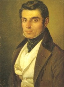 Raffaele Carelli, Portrait du précepteur R. Aurino, huile sur metal de 15 cm x 12 cm